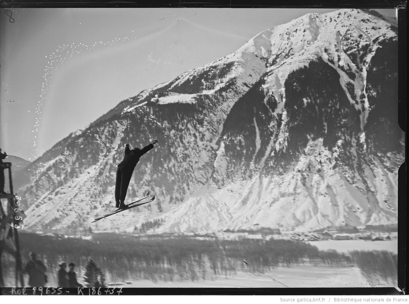 Chamonix, 2/2/24, Lind [combiné nordique, saut à ski] : [photographie de presse] / [Agence Rol]